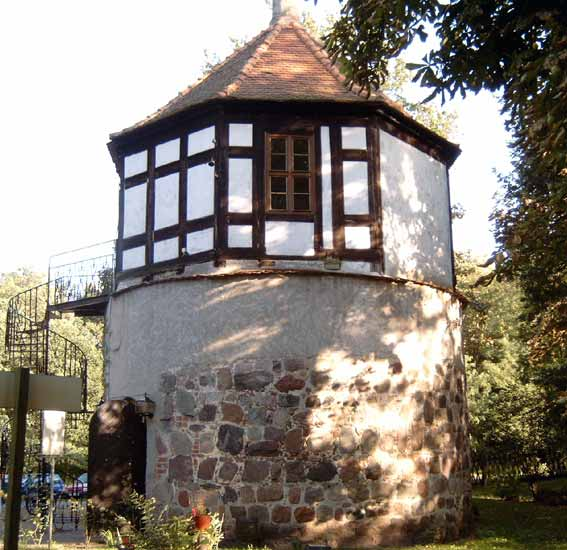 Der Turm der Neustädtischen Landwehr der Stadt Brandenburg an der Havel am Übergang der Buckau bei der Neuen Mühle südlich des Wohnplatzes Wendgräben